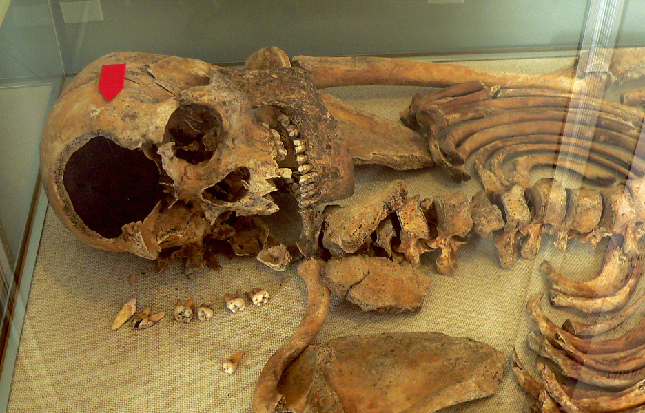 Defekter Schädel infolge Hiebverletzungbei einem 20-25-jährigen Mann von 1,71 Meter einer Bestattung auf dem Gräberfeld von Gevensleben